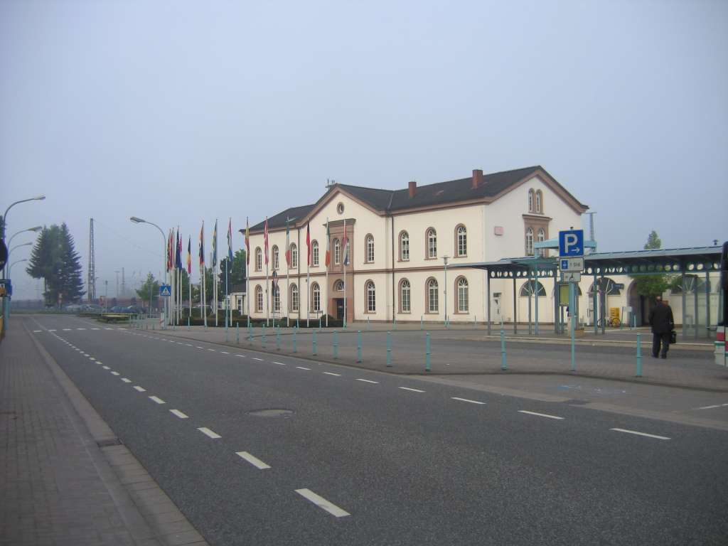 Das Empfangsgebäude des Bahnhofs Merzig